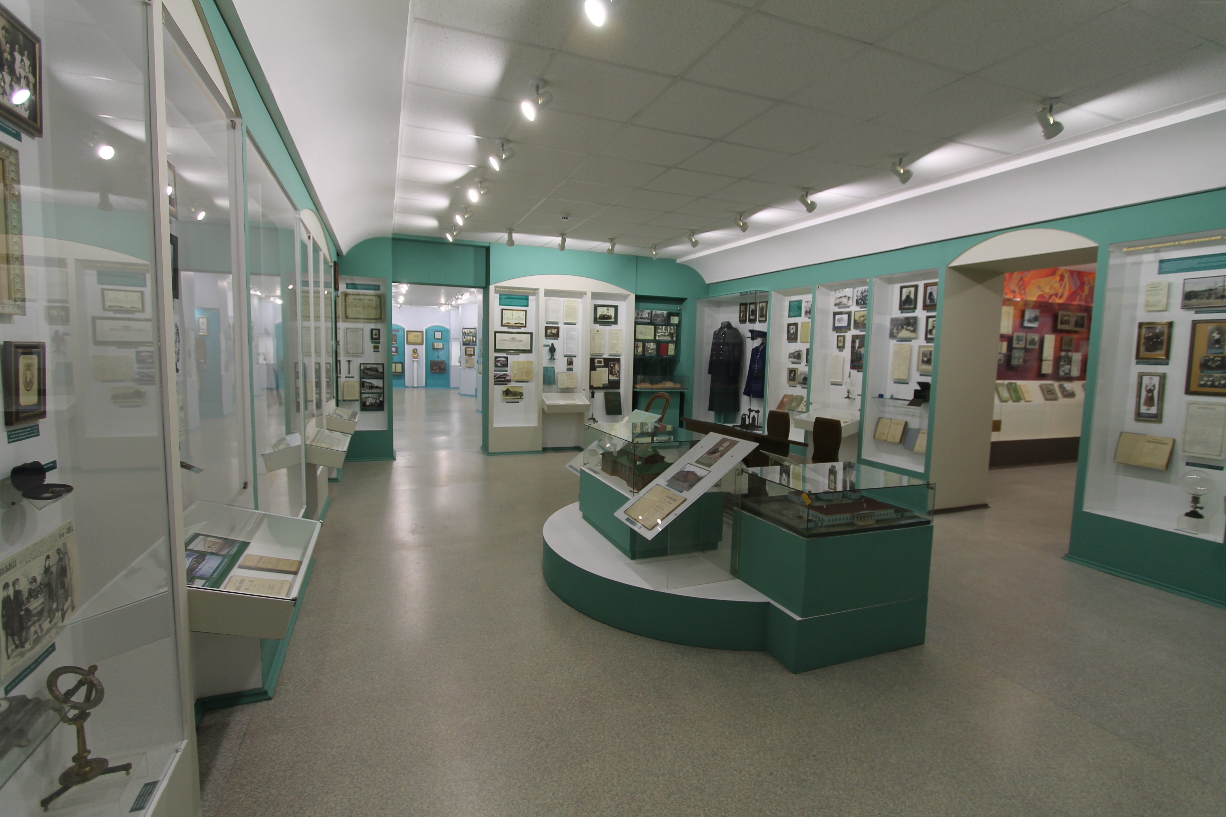 Экспозиция зала 2